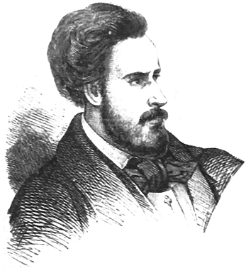 I.C. Brătianu